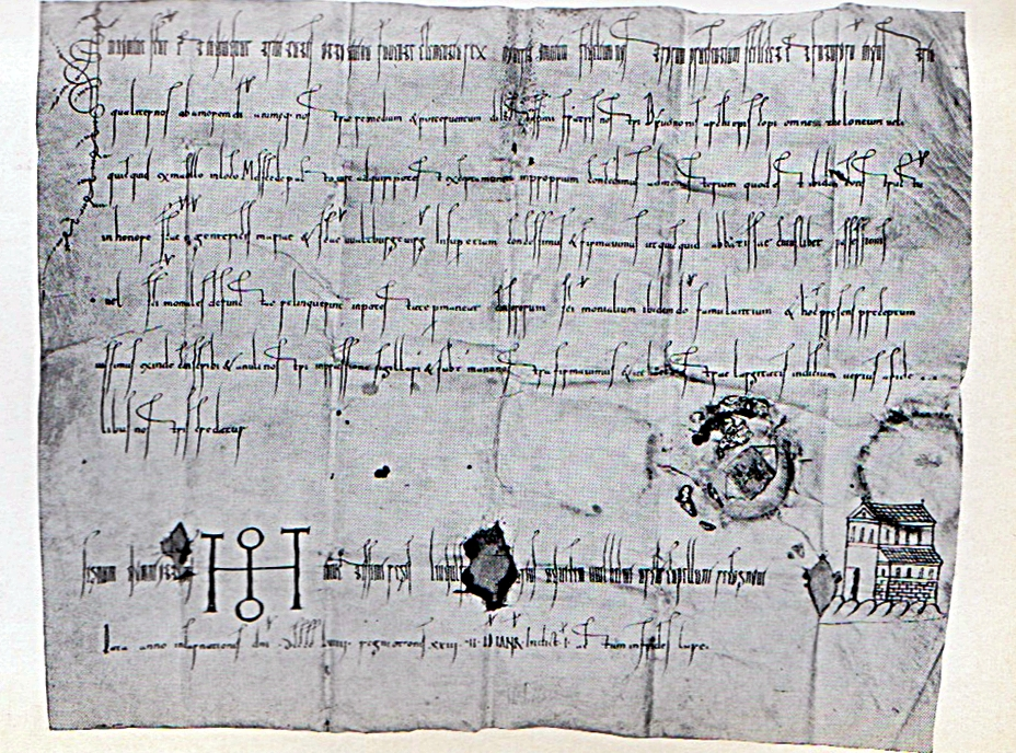 Meschede, alte Königsurkunde von 959